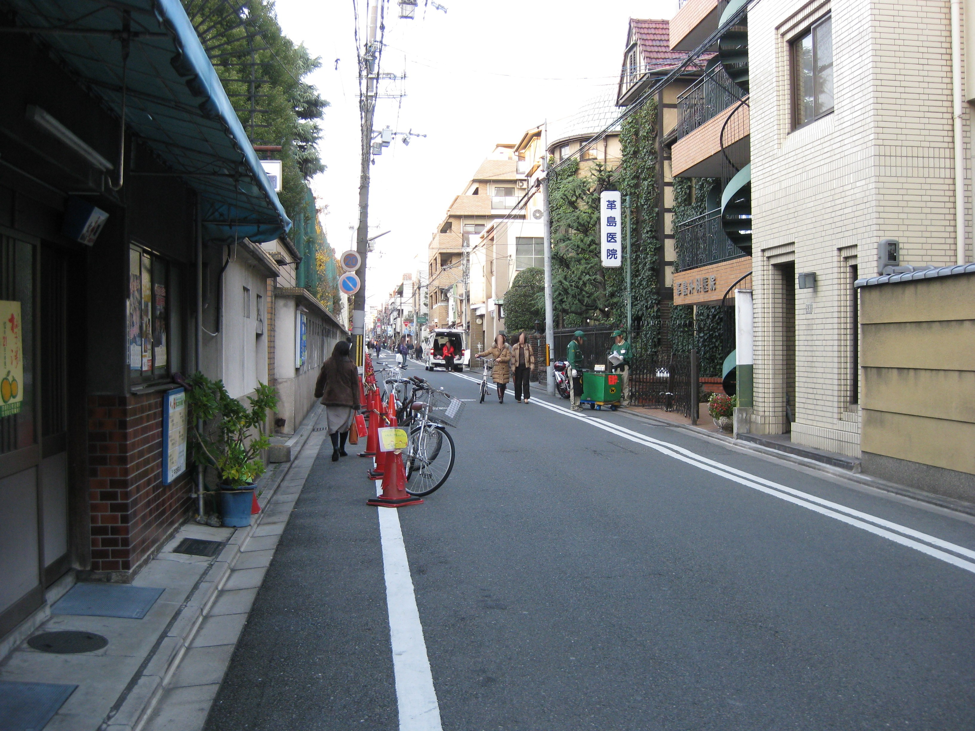 麩屋町通。蛸薬師通より北方向